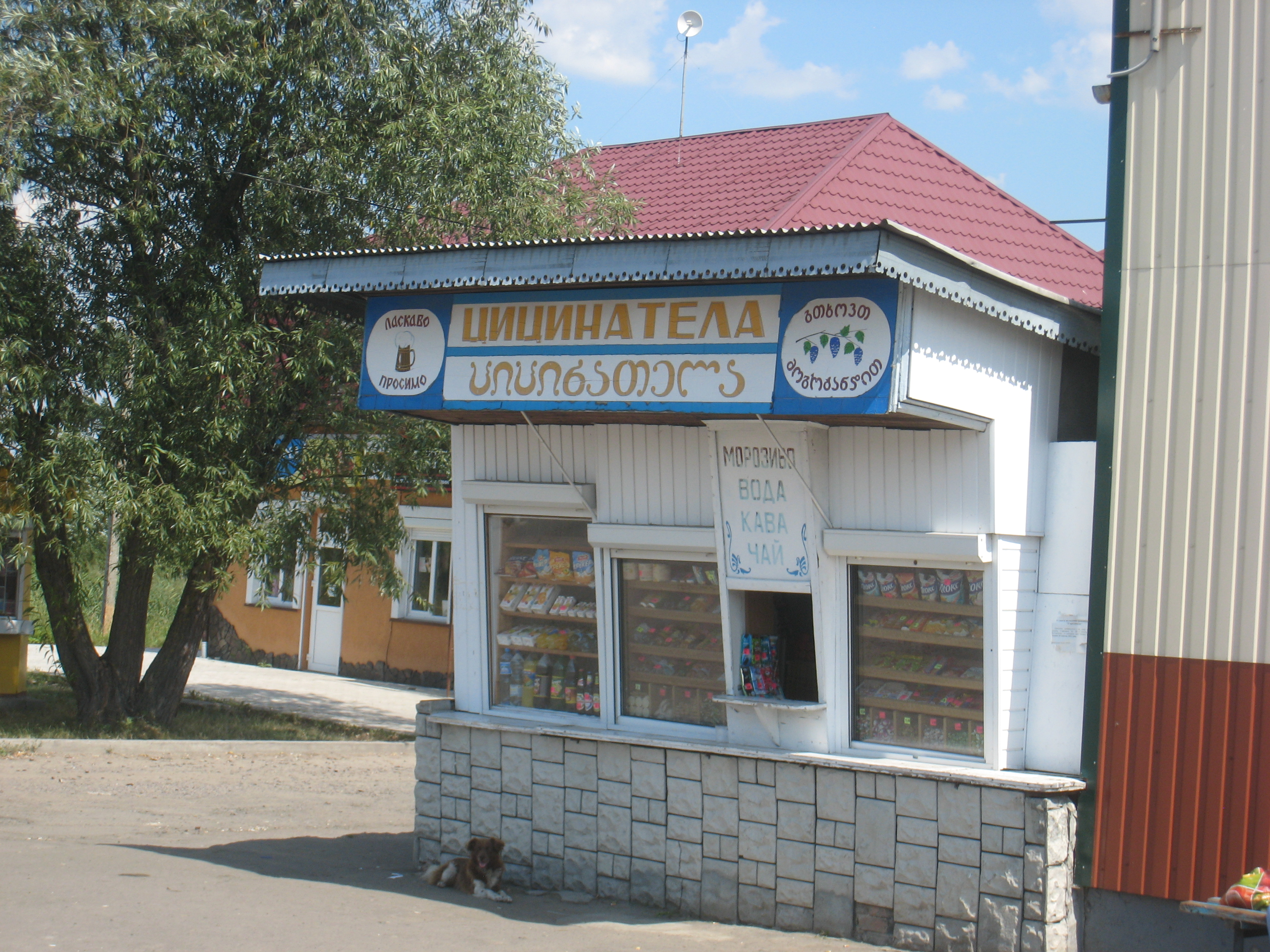 Secondo l'insegna sopra lo sportello il chiosco vende gelato, acqua, caffè e te